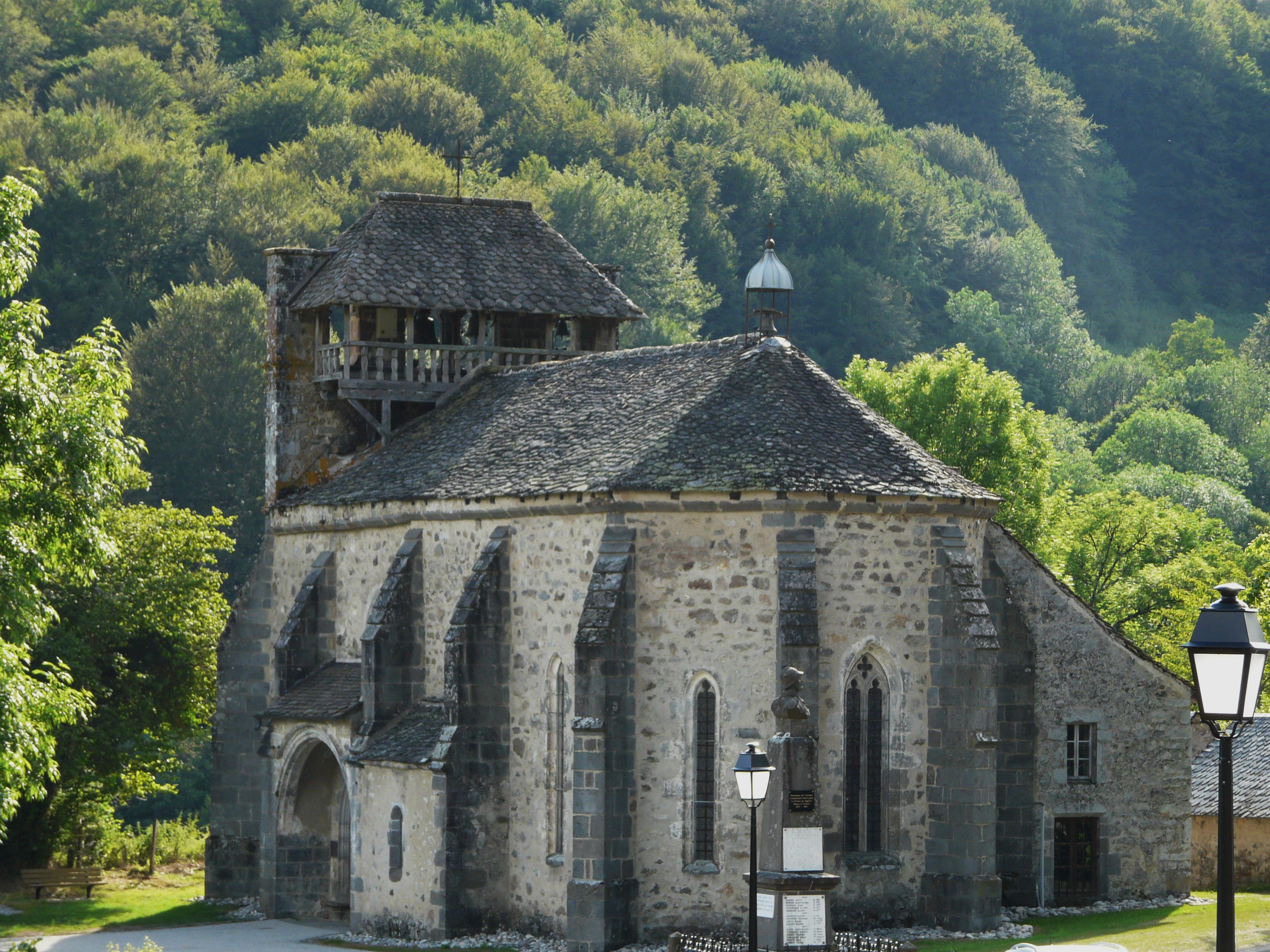 L'église Saint-Martin, Trémouille, Cantal, France.